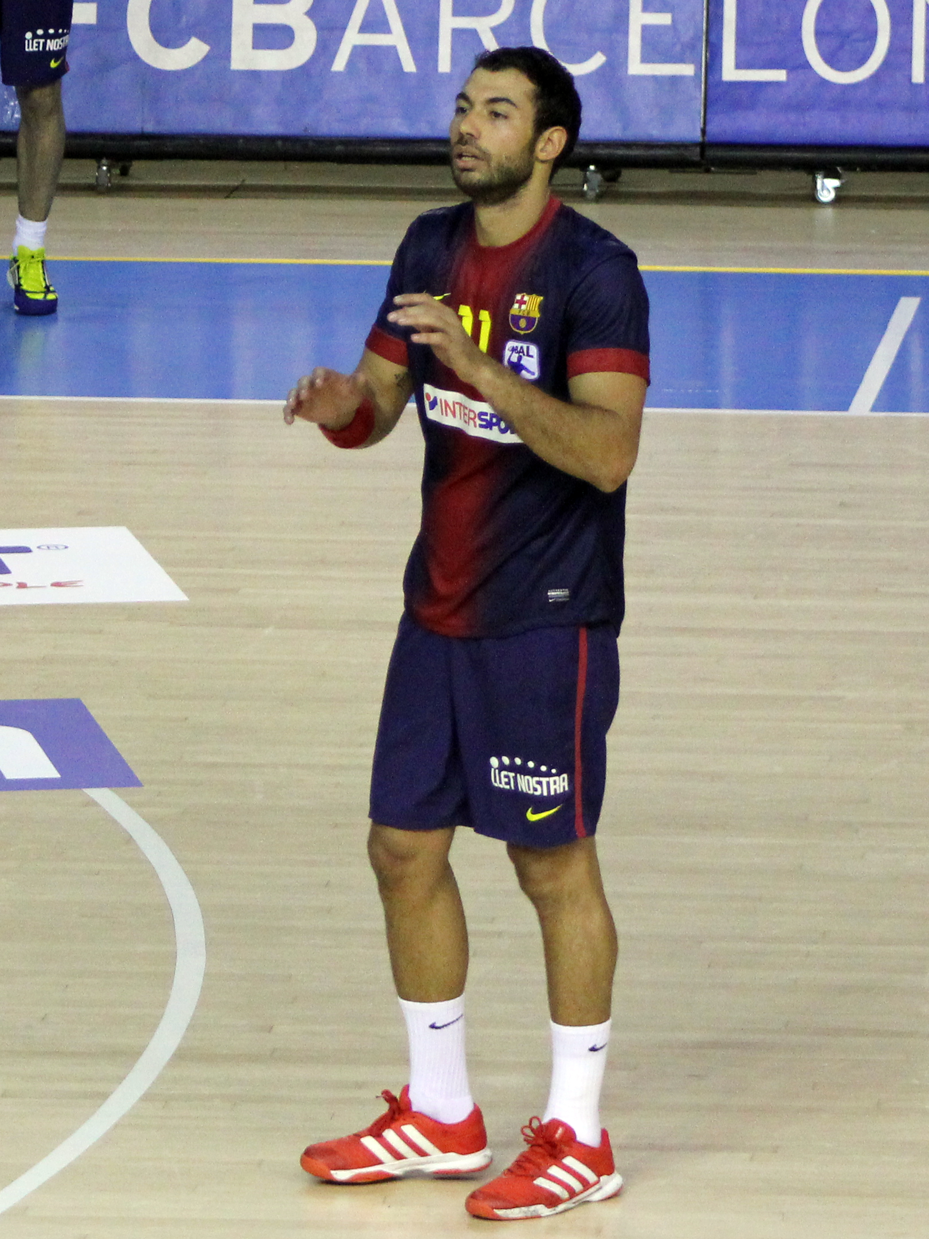 Foto realizada por Javier Segura (@castroquini en Twitter)